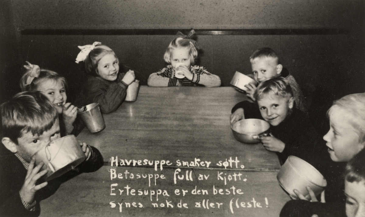 Barn som har fått servert "svenskesuppe" på ukjent sted i Oslo. Svenskesuppa var et av bidragene som den norske befolkningen mottok fra Sverige i humanitær bistand under den tyske okkupasjonen av Norge 1940-1945. Bildet har påskriften "Havresuppe smaker søtt./Betasuppe full av kjøtt./Ertesuppa er den beste/synes nok de aller fleste." skole, interiør, gutter, jenter, bespisning, svenskesuppe. DigitaltMuseum. Retrieved on 19:36, 12 September 2016 (UTC).